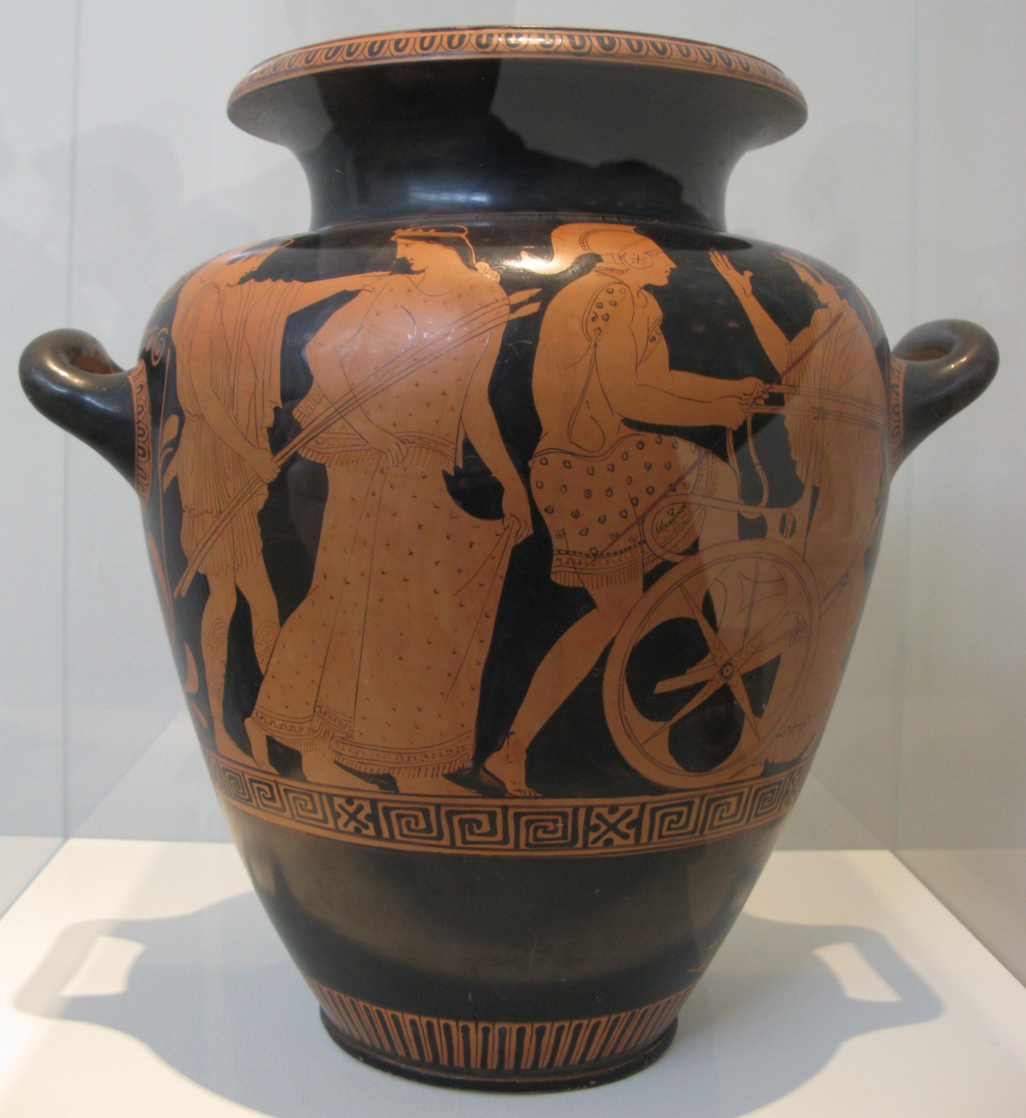 18063 Attic red - figured stamnos. Donated by the Kynazia family. It was probably found in a grave in Marathon and had been used as a funerary urn. Helen's first abduction by Theseus: Theseus is leading Helen to the chariot already prepared by Peirithoos. At the right Phoibe, Helen's sister, sees her off. Over the ftouree\ inscriptions, once painted in white, are discernible ΘΕΣΕΥΧ, HELENE, ΠΕΙΡΙ(θ)ΟΣ, ΦΟΙΒΑ Work of the painter Polygnotos Ca. 430-420 B.C. National Archaeological Museum, Athens, Greece. --- 18063 Αττική ερυθρόμορφη στάμνος. Δωρεά της οικογένειας Κυριαζή. Βρέθηκε πιθανώς στον Μαραθώνα σε τάφο και είχε χρησιμοποιηθεί ως τεφροδόχος κάλπη. Απεικονίζεται η πρώτη αρπαγή της Ελένης από το Θησέα: Ο Θησεύς οδηγεί την Ελένη στο άρμα που έχει έτοιμο ο Πειρίθους. Δεξιά η αδερφή της Ελένης, Φοίβη, την αποχαιρετά. Πάνω από τις μορφές με λευκά άλλοτε γράμματα διακρίνονται οι επιγραφές ΘΕΣΕΥΣ, ΗΕΛΕΝΕ, ΠΕΡΙ(θ)ΟΣ, ΦΟΙΒΑ. Εργο του αγγειογράφου Πολυγνώτου. Γύρω στο 430-420 Π.Χ. Εθνικό Αρχαιολογικό Μουσείο. Αθήνα.